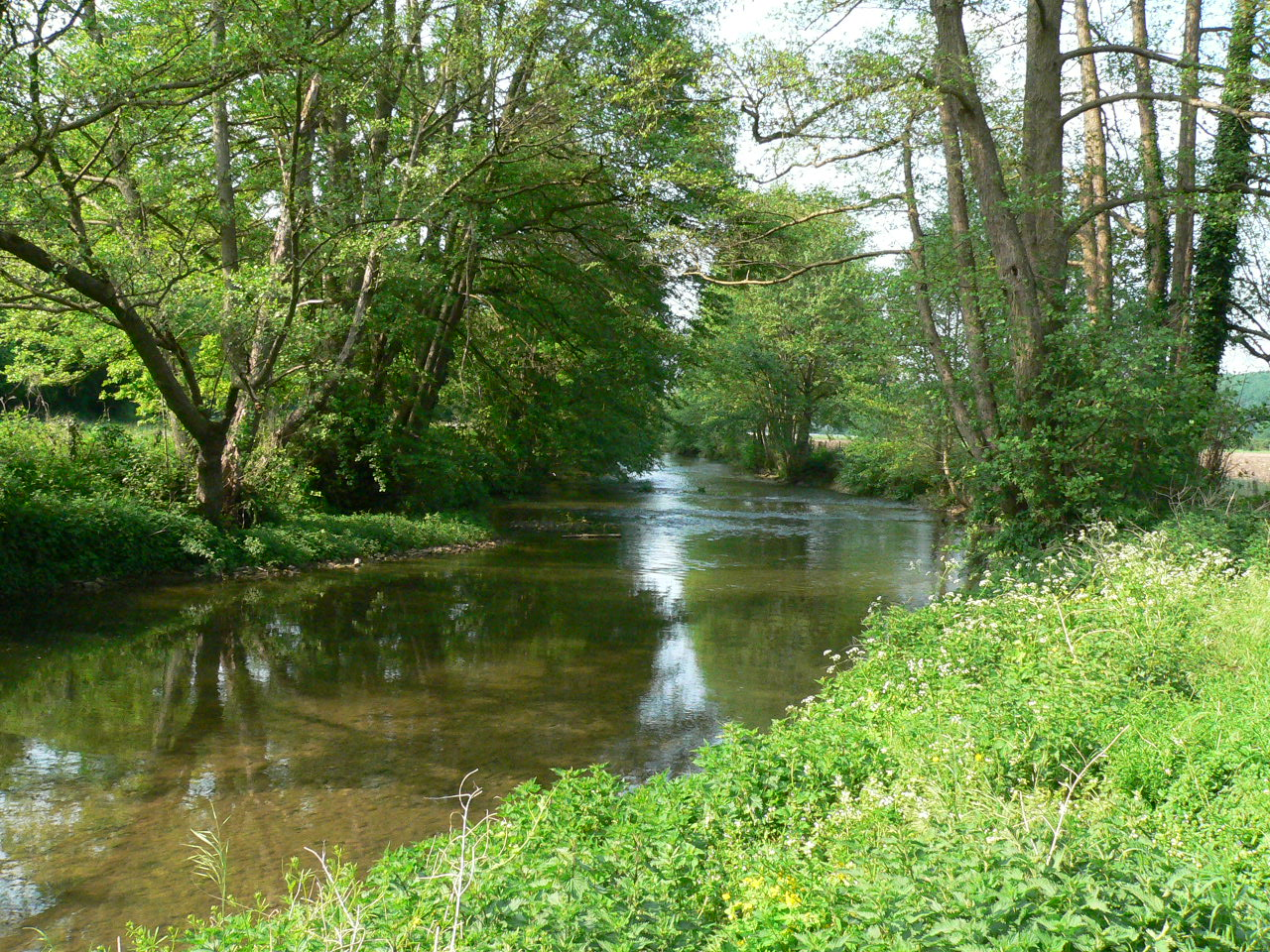 La Risle (rivière) près de Grosley-sur-Risle (Eure)